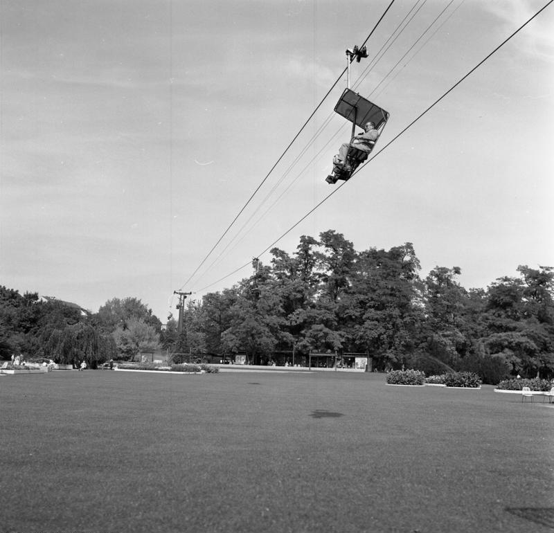 Bundesgartenschau 1961 Stuttgart 11.-16.9.1961